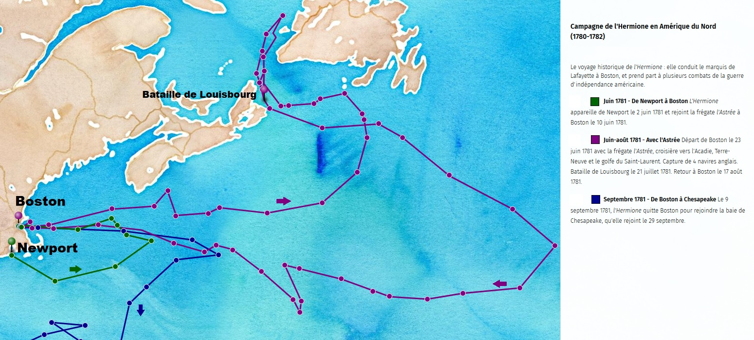 Parcours de la frégate française l'Hermione, sous le commandement de Latouche, de juin à septembre 1781, d'après les positions données dans le livre de bord. Parcours commun à celui de la frégate l'Astrée, sous le commandement de Lapérouse, du 23 juin au 17 août 1781.